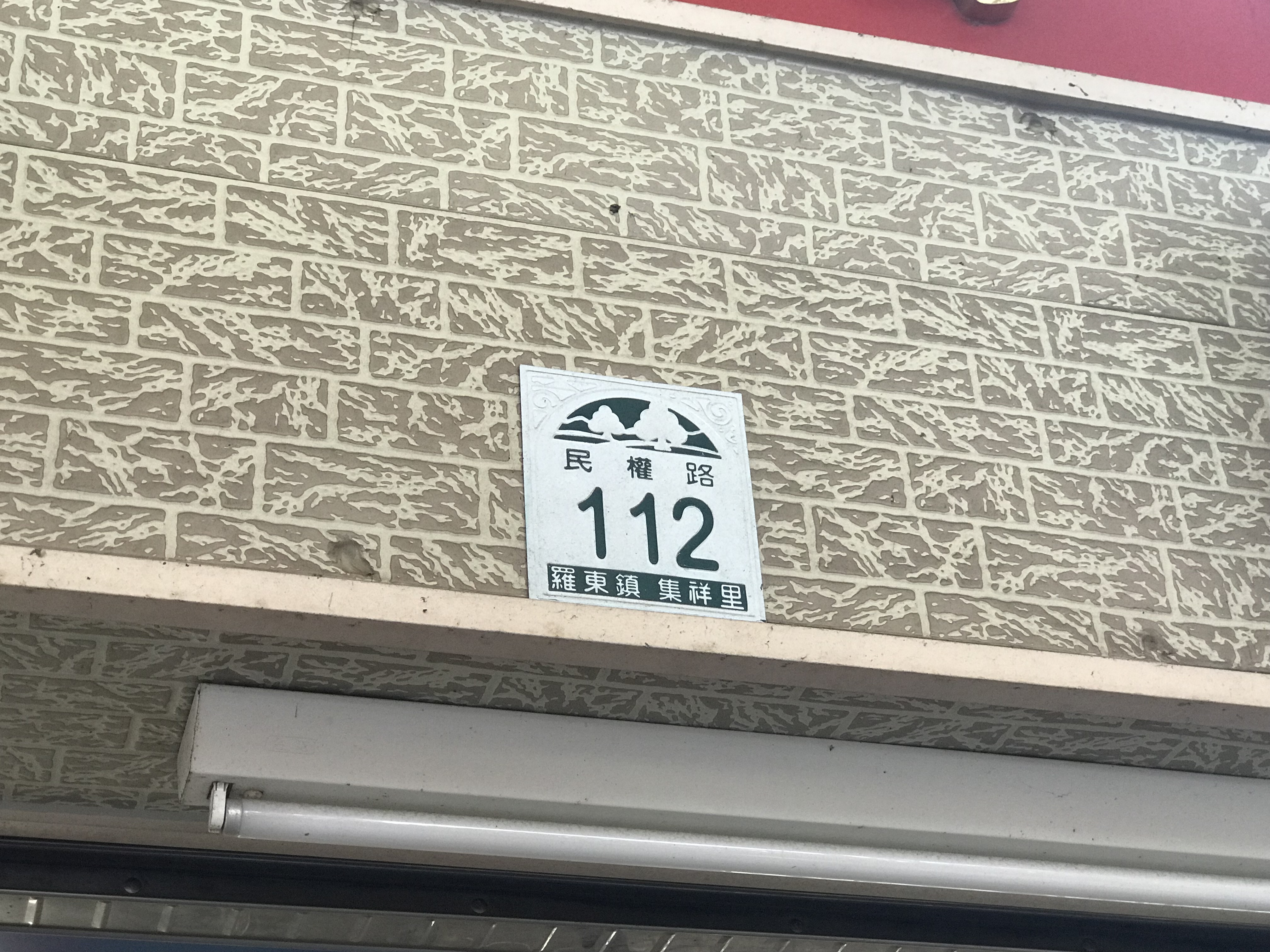 羅東中山公園福德廟門牌